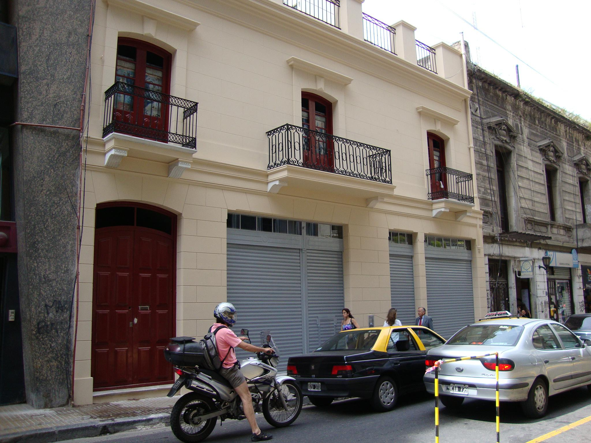 Los Altos de Ezcurra, residencia de doña María Josefa Ezcurra, pariente política de Juan Manuel de Rosas, construida hacia 1830. Propiedad del Museo de la Ciudad, restaurada en 2009. Calle Adolfo Alsina 455. Barrio de Monserrat, ciudad de Buenos Aires, Argentina.